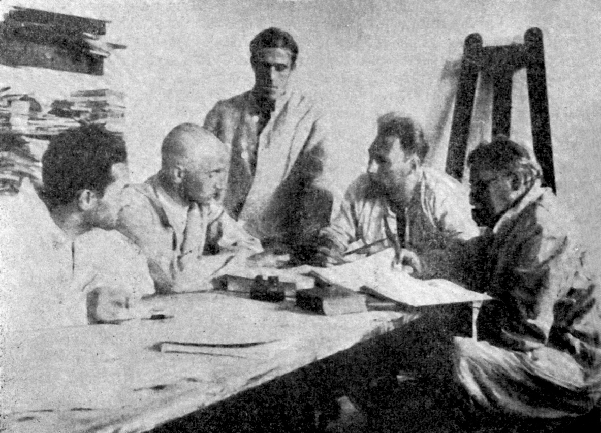 Srpskohrvatski / српскохрватски: Politički zatvorenik Moša Pijade sa drugovima na robiji.